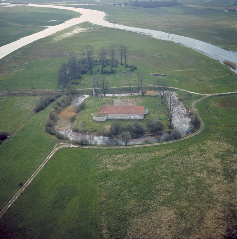 Raä-nr: Kristianstad 215:1. Borgområde med slottsruin, från norr. Motiv: Kristianstad 215:1 Nyckelord: Flygbilder Kategori: Borg, Slott/herresäte Raä-nr: Kristianstad 215:1. Borgområde med slottsruin, från norr. Kristianstad 215:1.